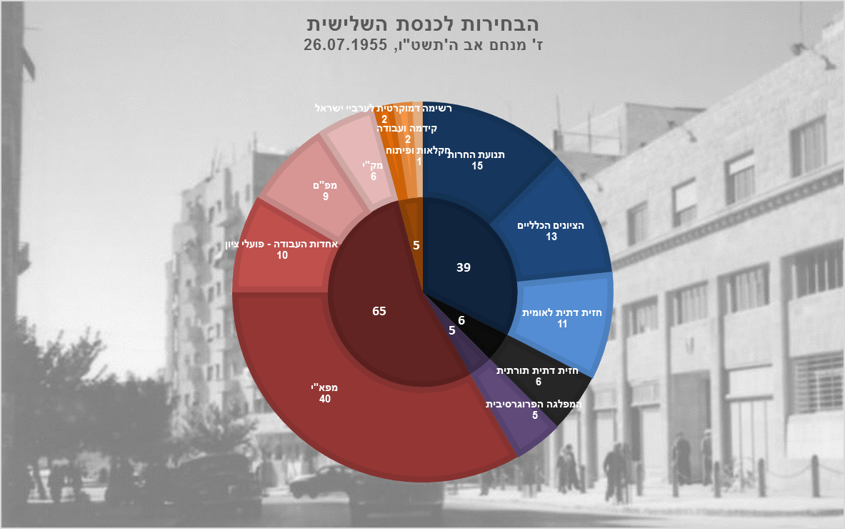 תוצאות הבחירות לכנסת השלישית